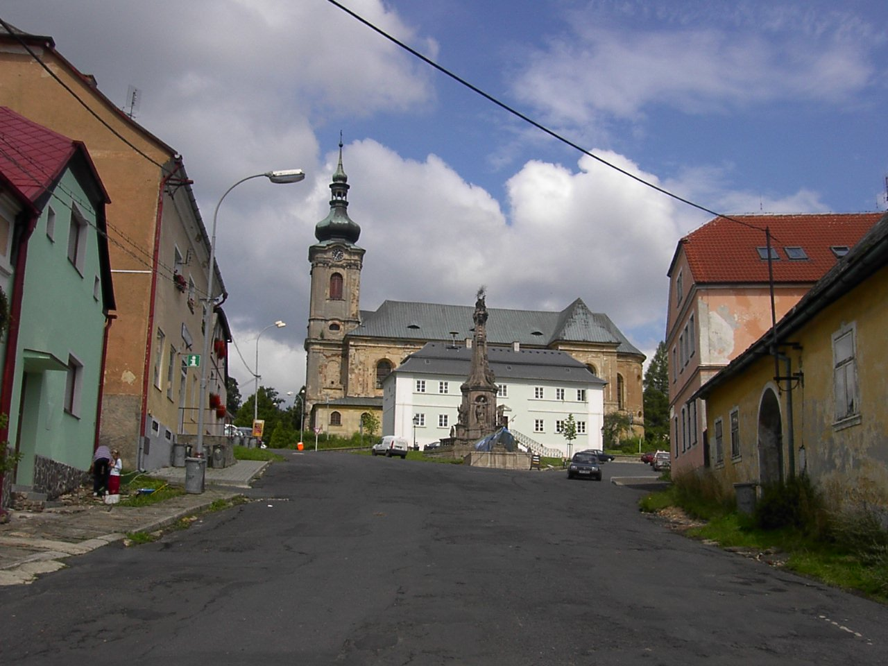 Square in Tepla, Czech Republic. Panorama náměstí v Teplé s kostelem sv. Jiljí